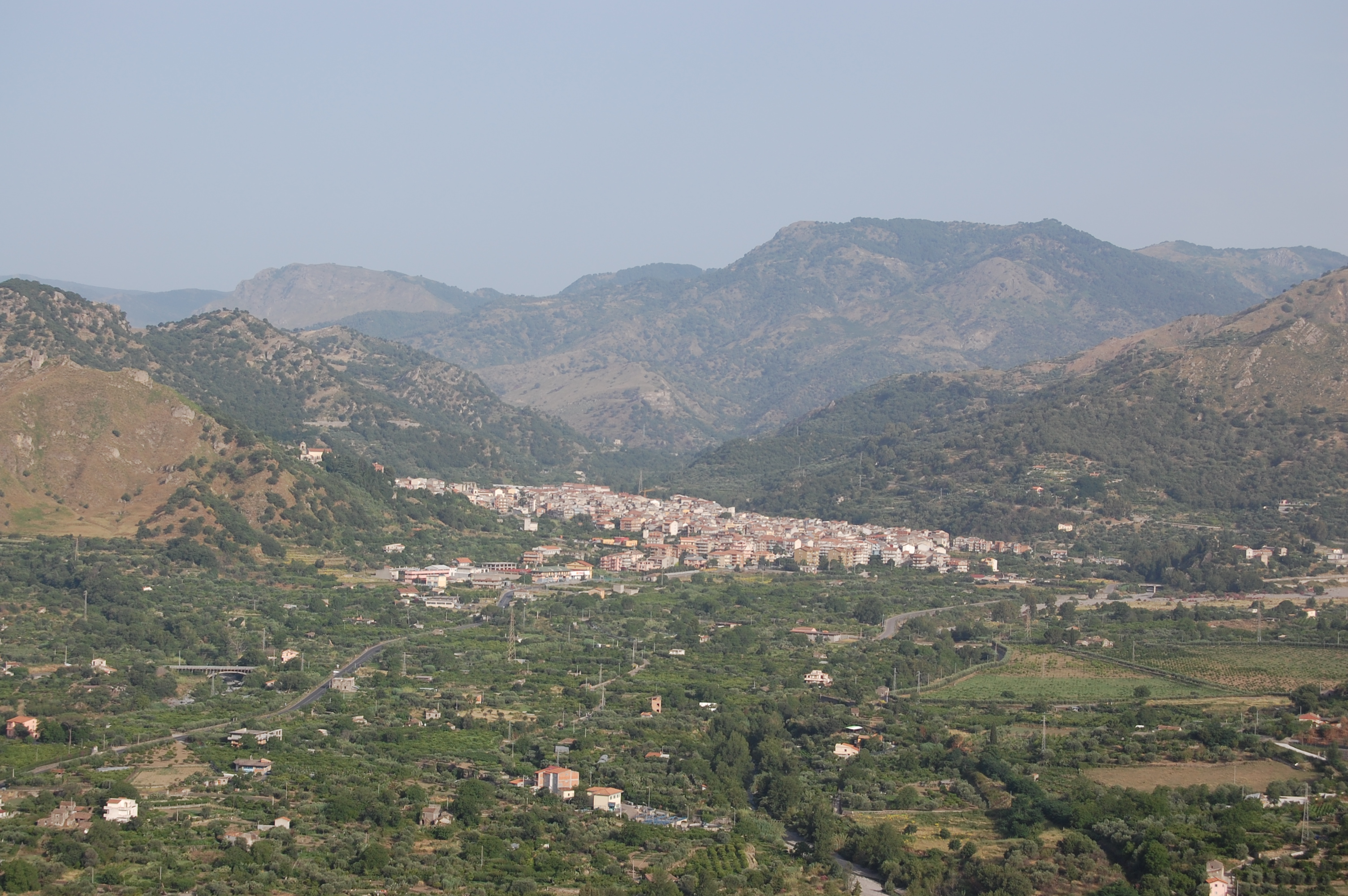 Il comune di Francavilla di Sicilia visto da Motta Camastra, provincia di Messina, Sicilia.